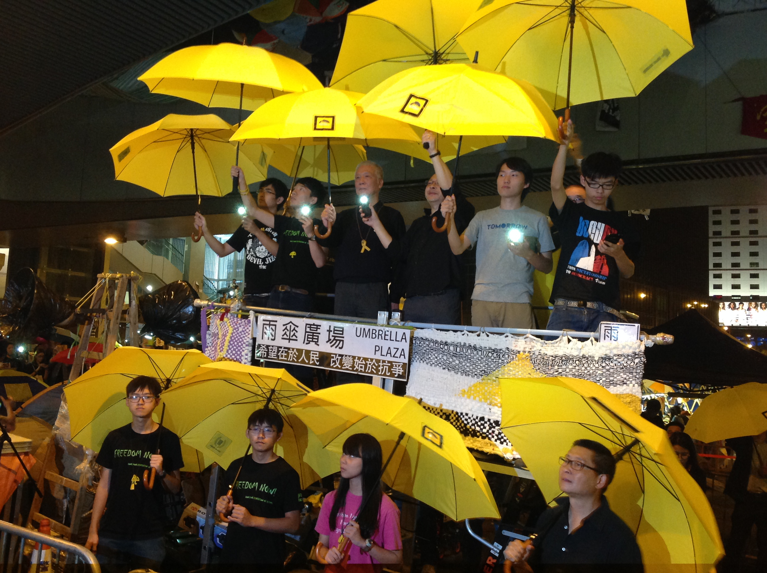 金鐘佔領區紀念香港佔領運動滿月（美國之音海彥拍攝）